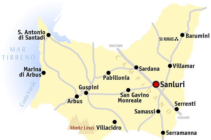 Kaart van de provincie Medio Campidano